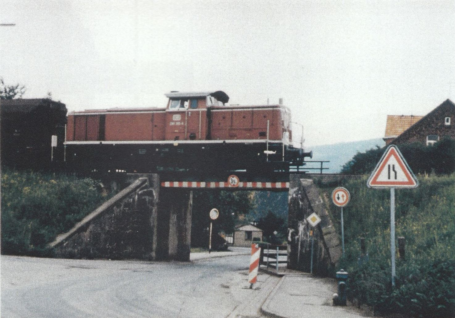 Bahnbrücke in der Reinerbeckerstr. in Aerzen. Diese Straßenüberführung war einer der Gründe für die Streckenstilllegung. Foto: R.Maritschnigg